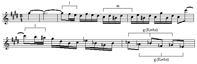 GNU-FDL, selbst erstellt